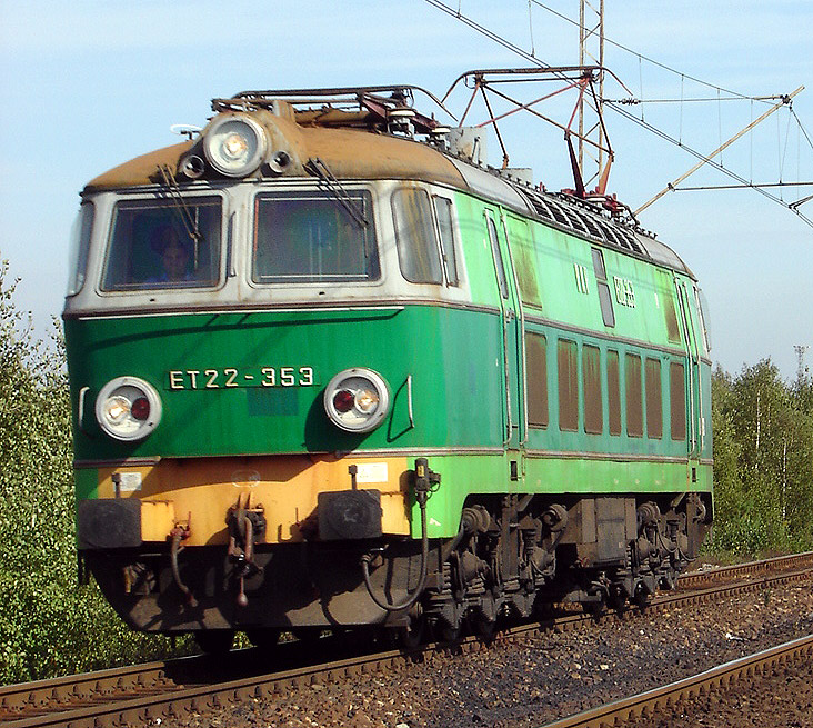 ET22-353 na szlaku Jaworzno Szczakowa - Sosnowiec Jęzor. 7 października 2006.